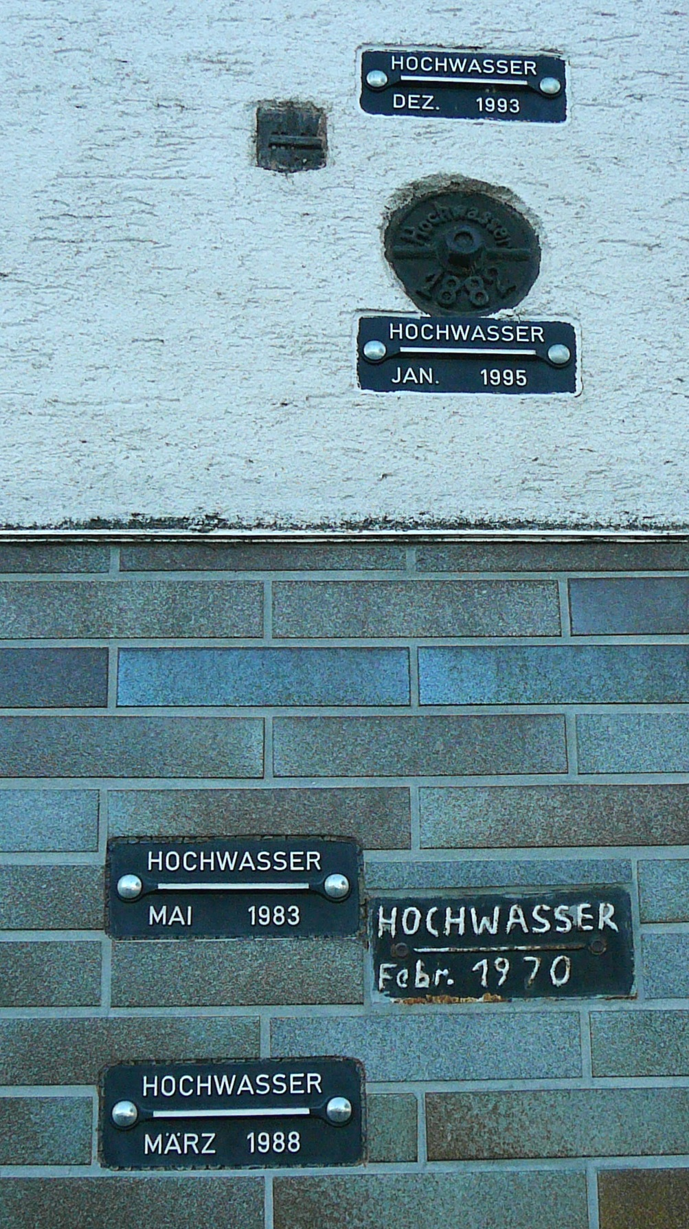 Hochwassermerken an einer Hauswand In Koblenz-Neuendorf direkt am Rheinufer